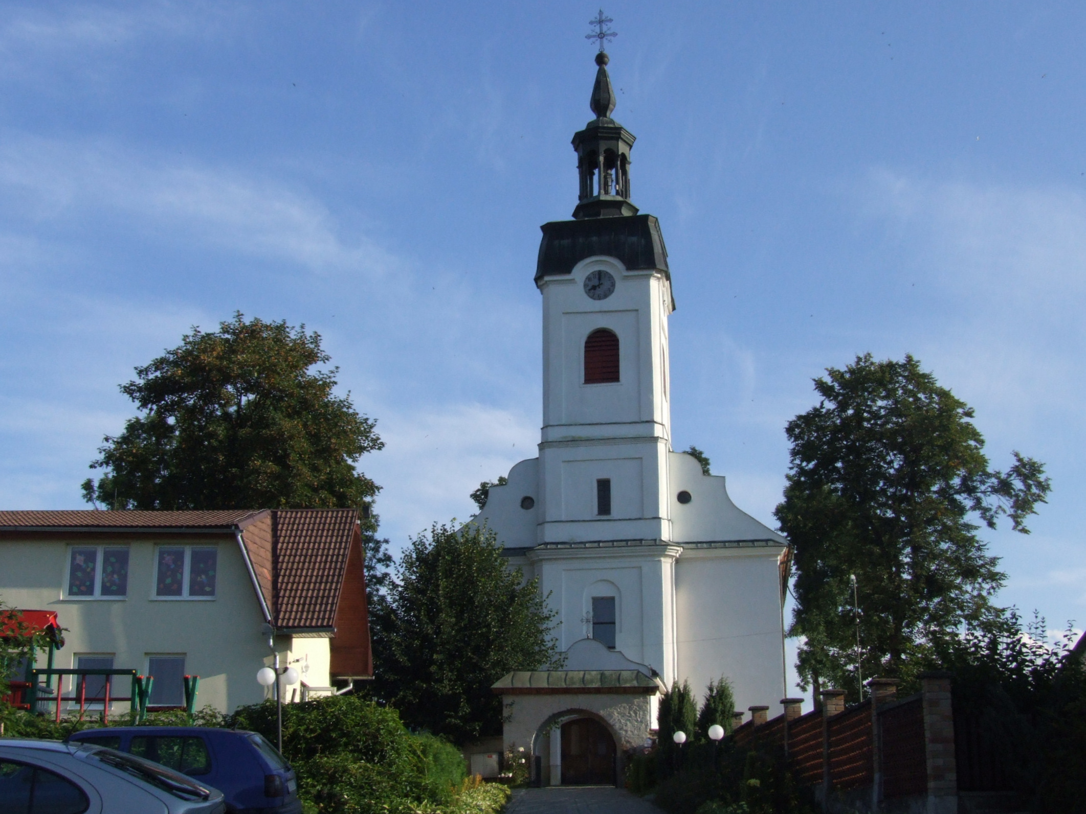 Hladovka kościół greckokatolicki